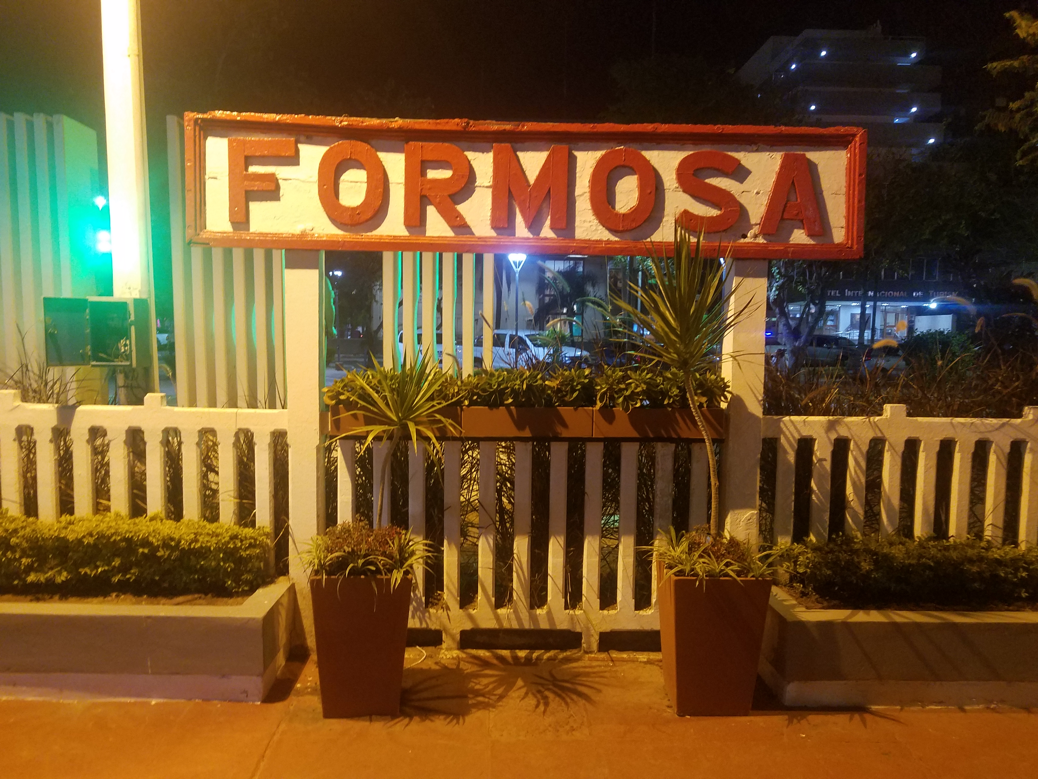 Estación Formosa